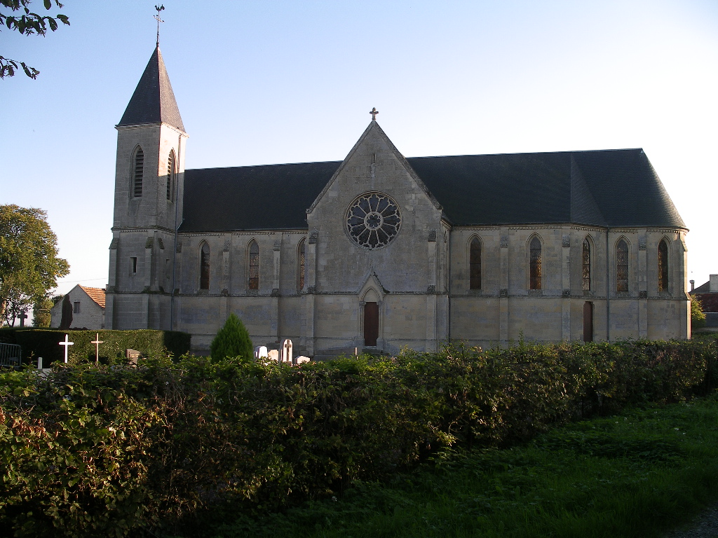 Église de Robehomme à Bavent (Calvados)